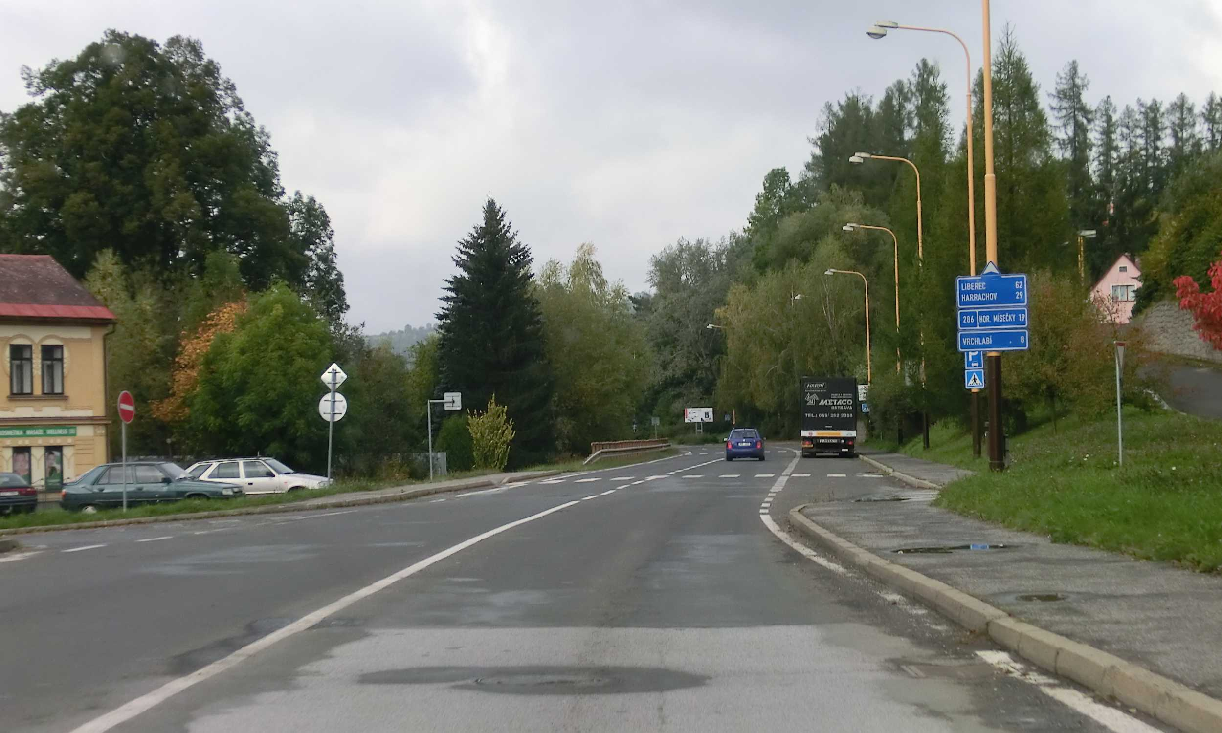 Česky: Silnice II/286 vyjíždí z kruhového objezdu pod jilemnickou poštou a míří na sever do Krkonoš.